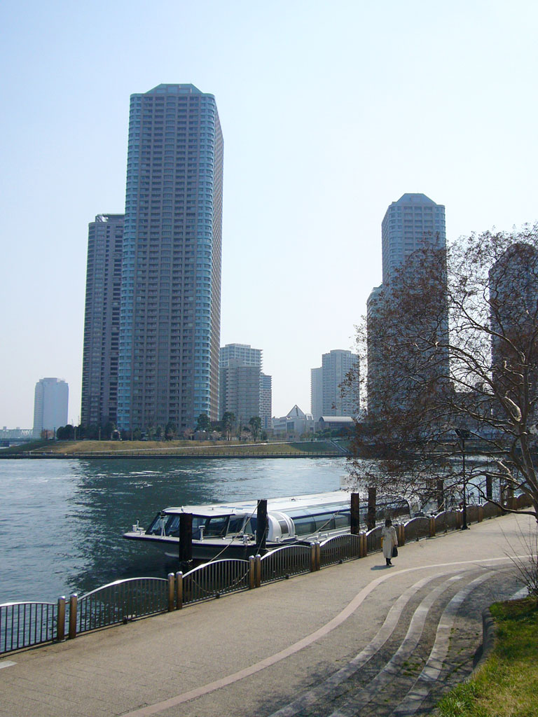 Tokyo Mizube Cruising Line at Chuo-ku, Tokyo, Japan